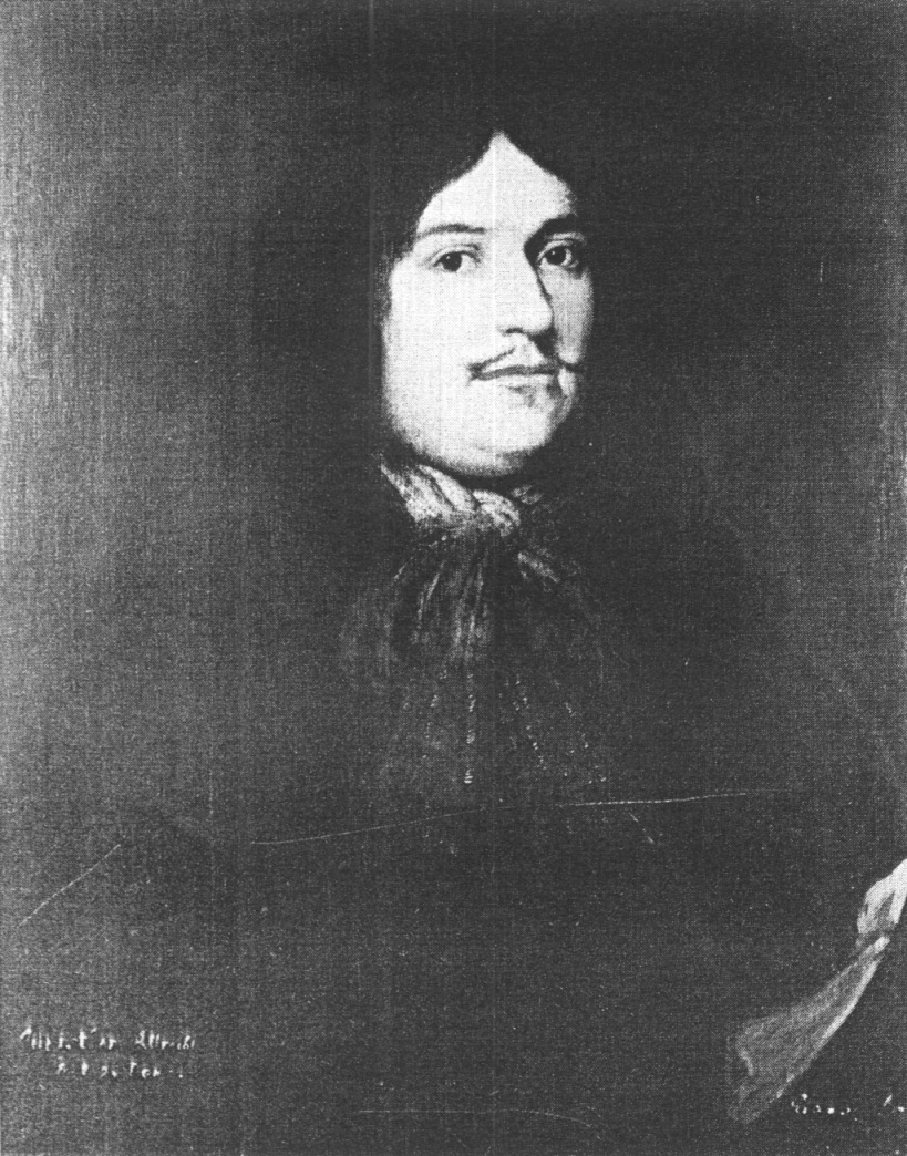 Dohna, Christian Albrecht Burggraf und Graf zu (1621–1677), General.